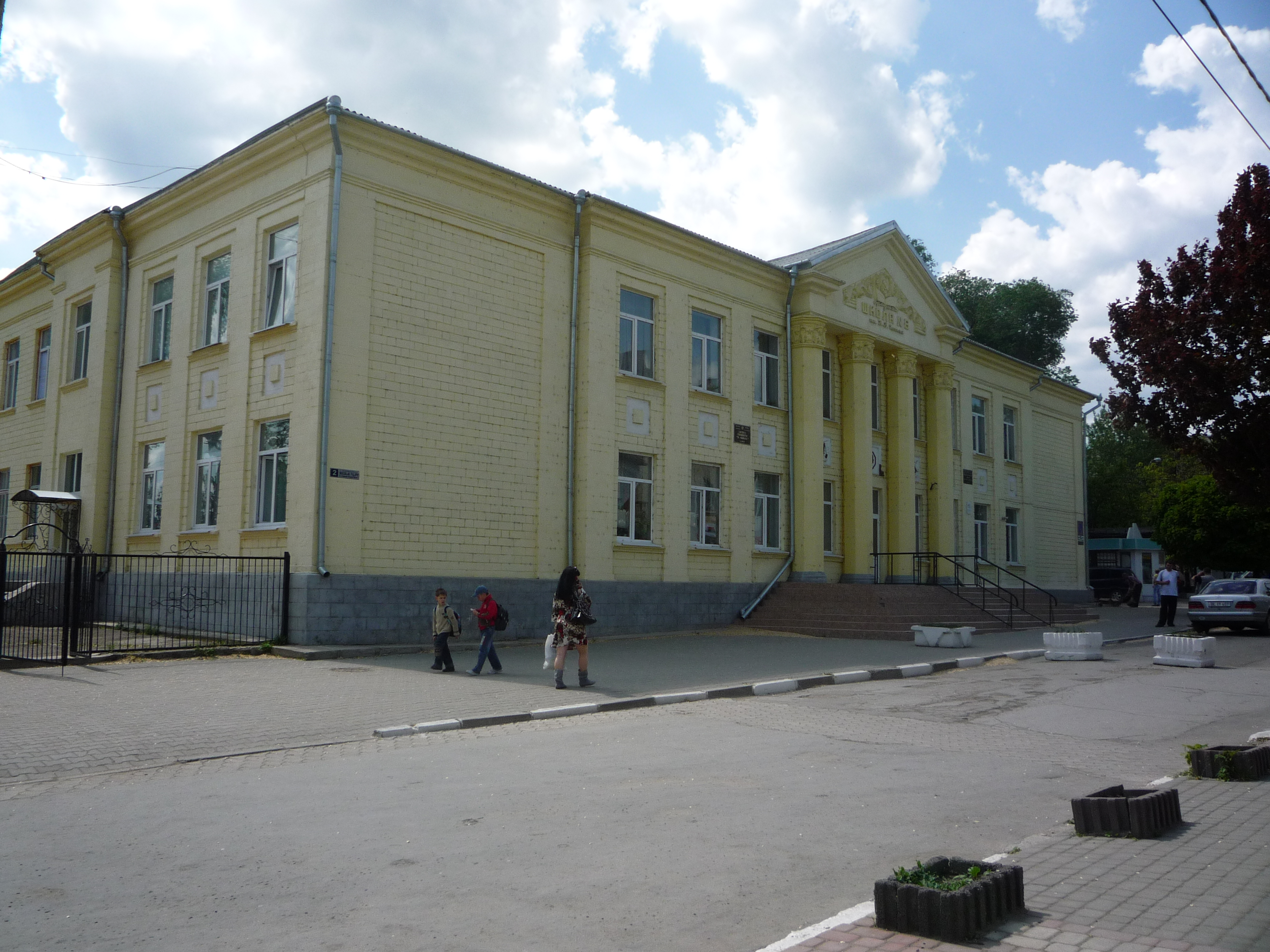 Liceul Gogol din Balti